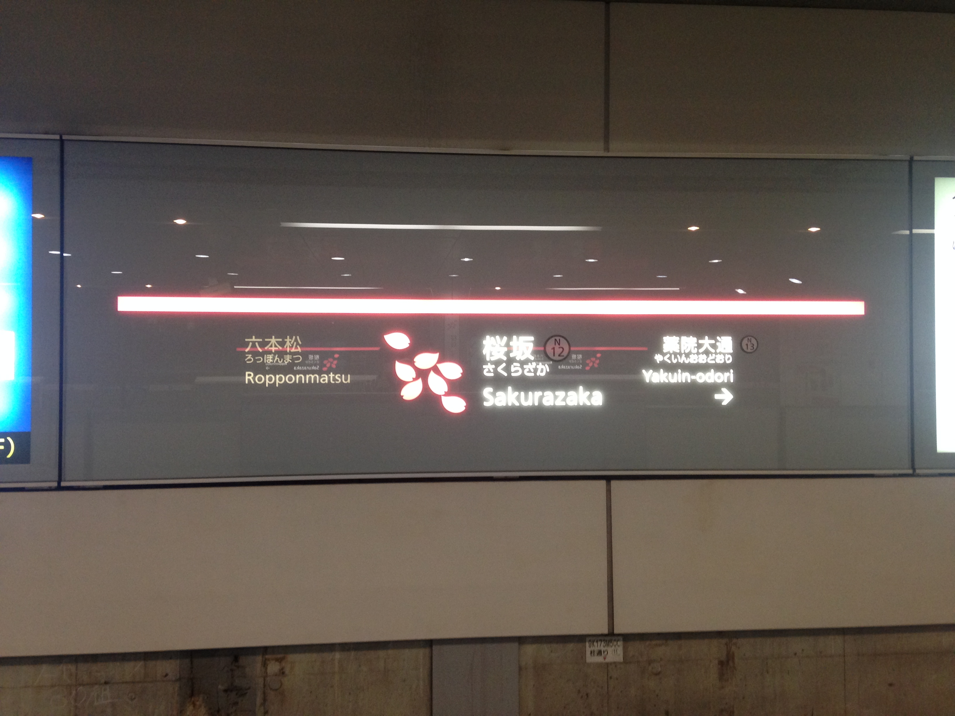 桜坂駅の駅名標。イラストは「桜坂」にちなんでサクラ